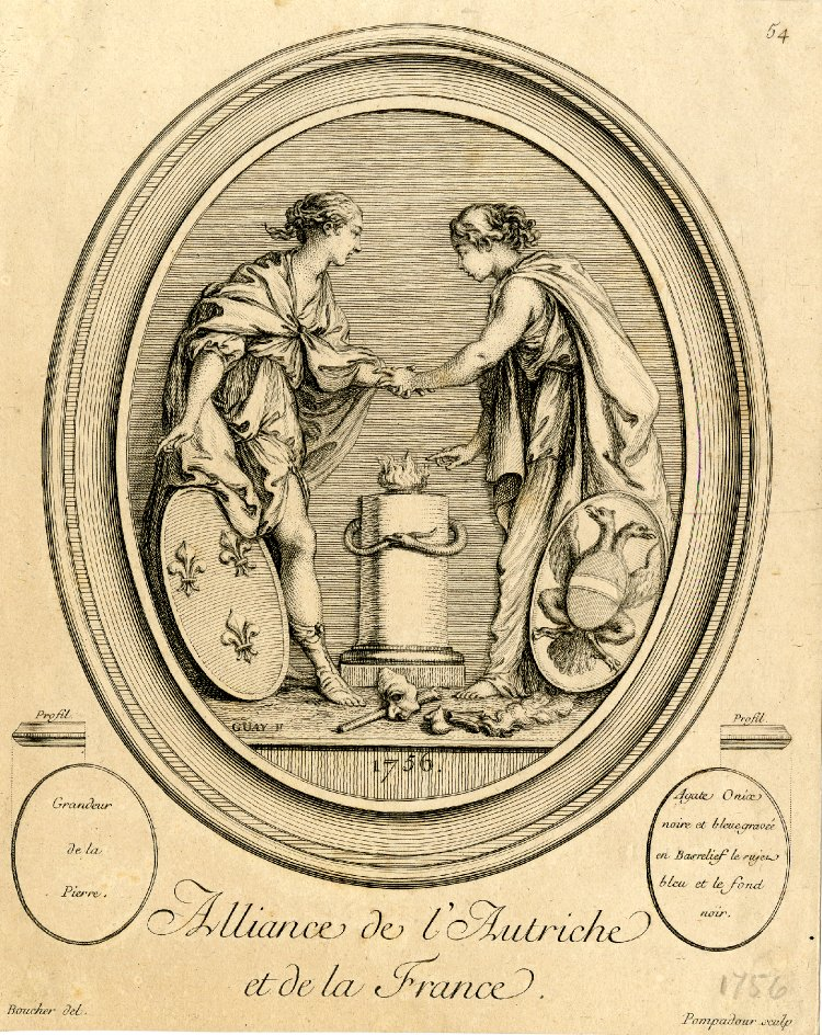 Suite d'estampes Gravées par Madame la Marquise de Pompadour d'après les Pierres gravées de Guay Graveur du Roy